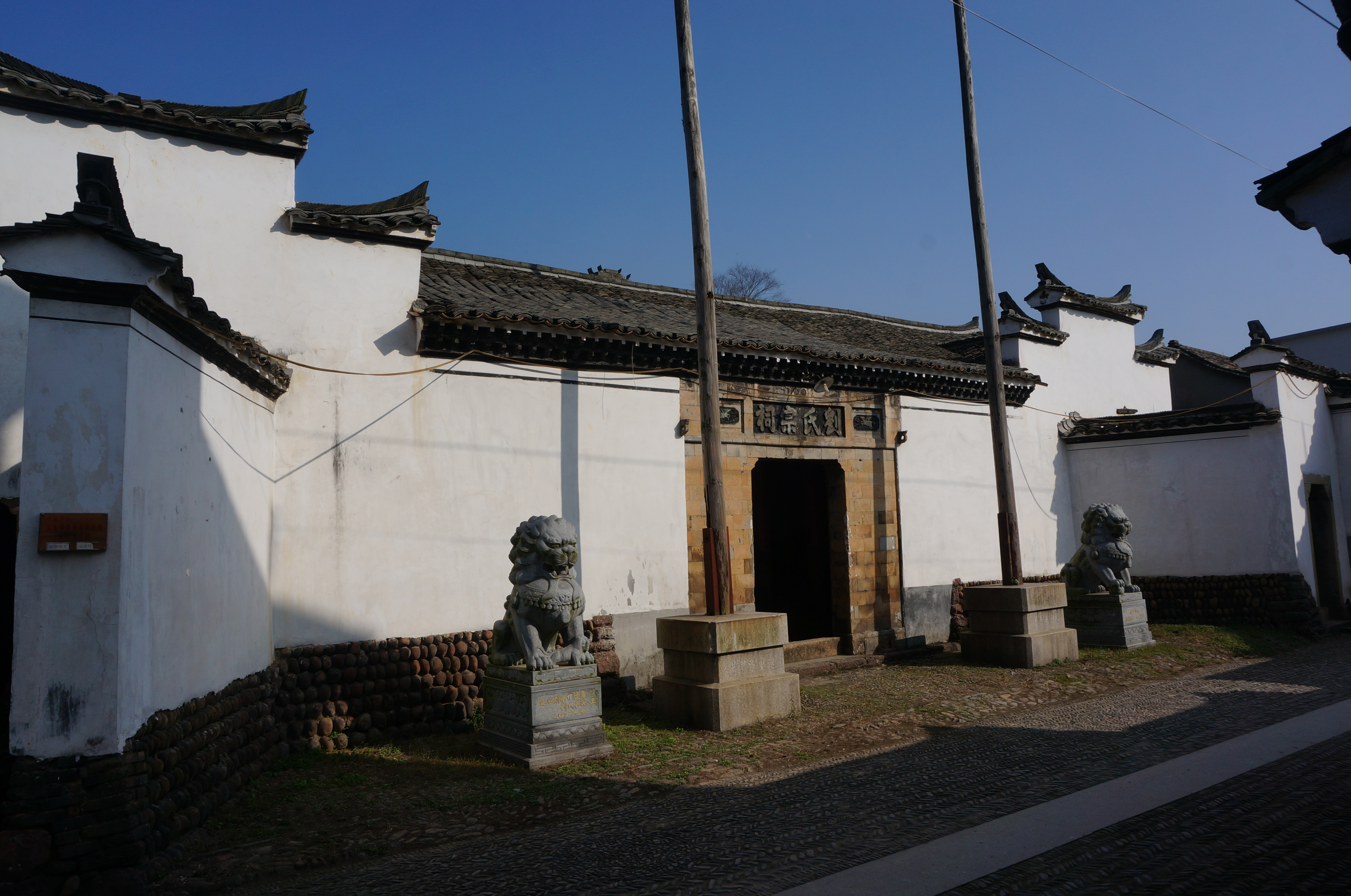 界首村刘氏宗祠，门厅南面。